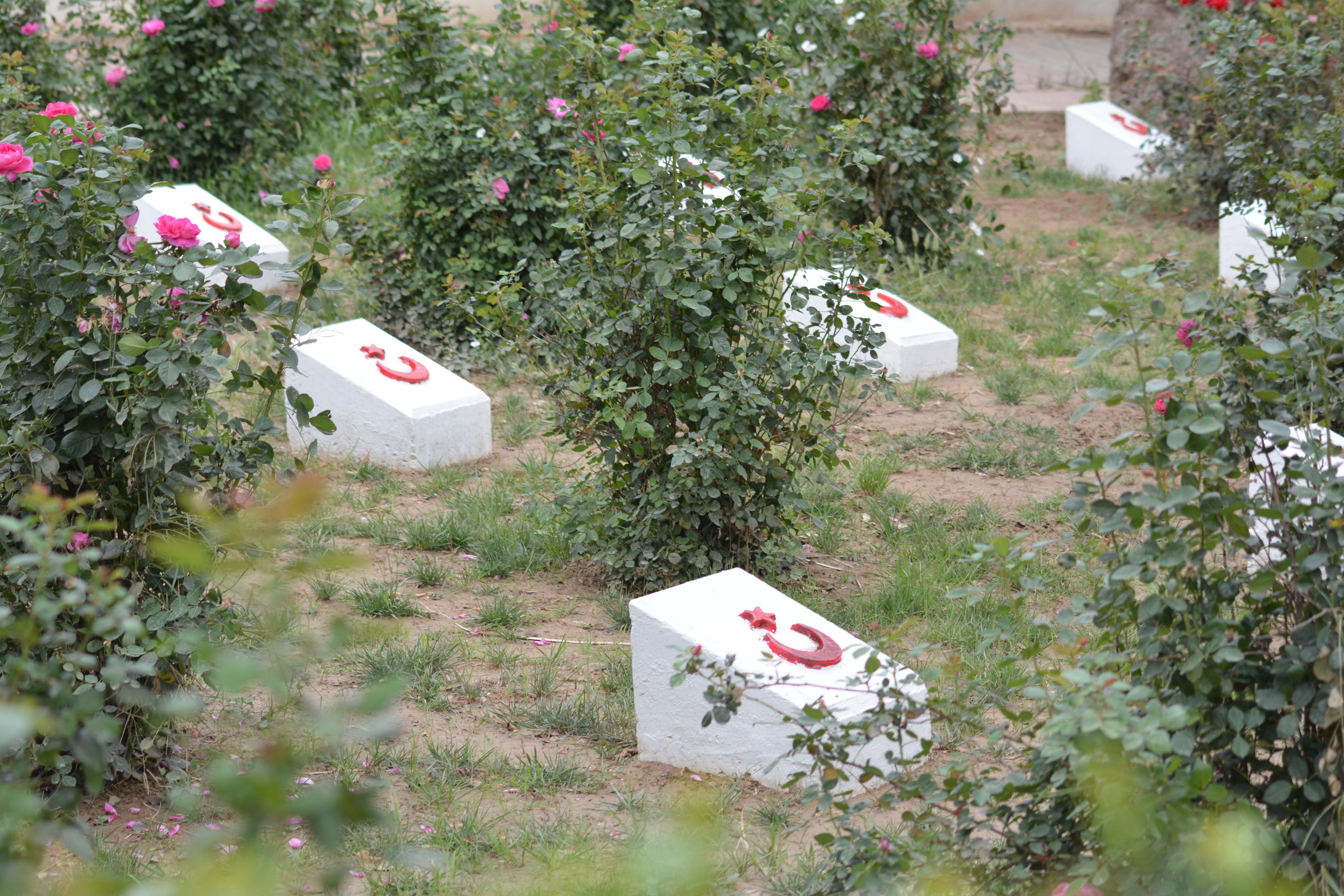 Türk Şehitliği - Kut, Irak